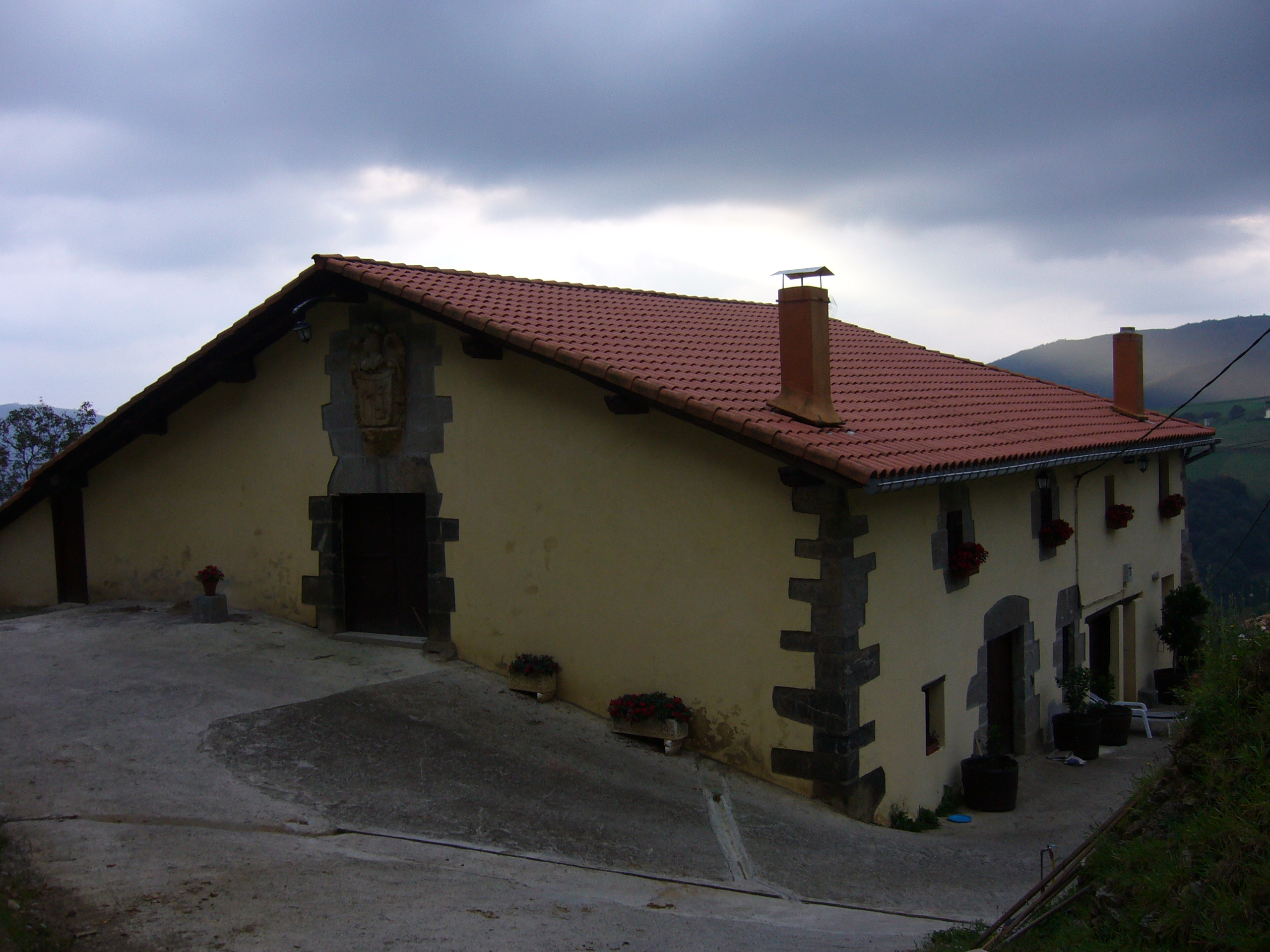 Aizpitarte baserria, aia. Ondare izendatuta